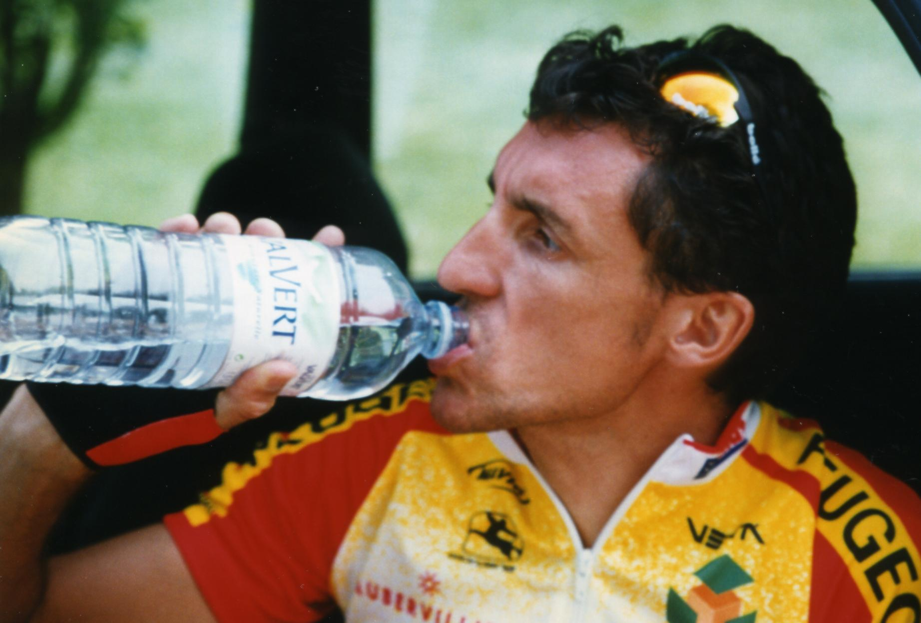 CRITERIUM DE LEVES 1997